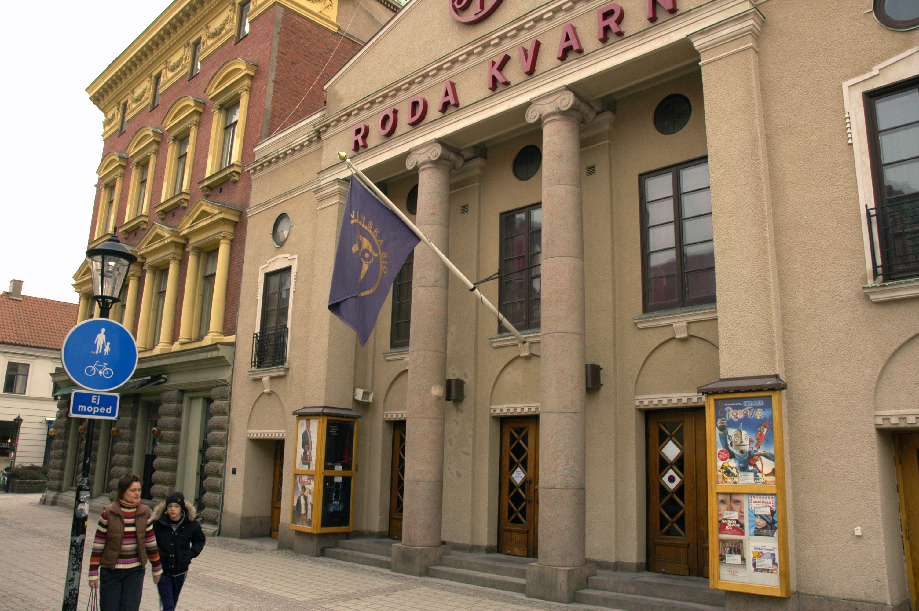 Movie theater "Röda kvarn" in Halmstad, Sweden.